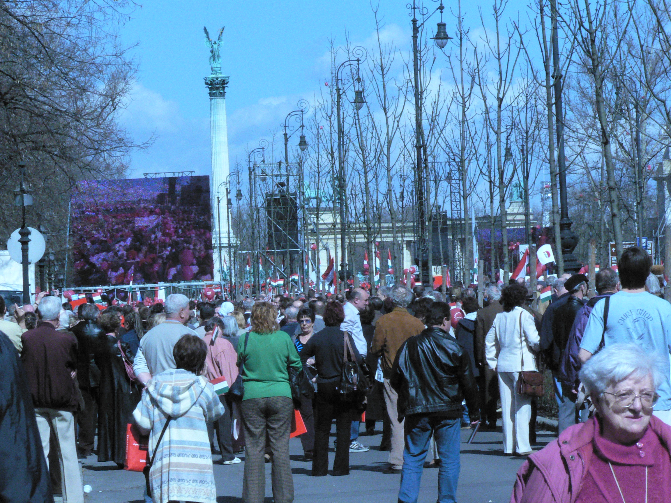 A felvétel 2006. április 1 – én készült Budapesten. A Magyar Szocialista Párt naggyűlést tartott a Hősök terén. Andrássy út kis földalatti megálló (a Belváros irányában). Megjelent a Metapolisz 1 (választás) DVD-n ISBN 963-229-987-6 ©© Derzsi Elekes Andor, Budapest 2014